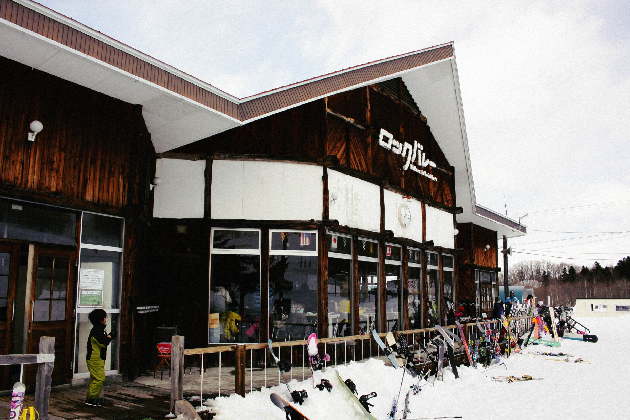 遠軽町ロックバレースキー場センターハウス